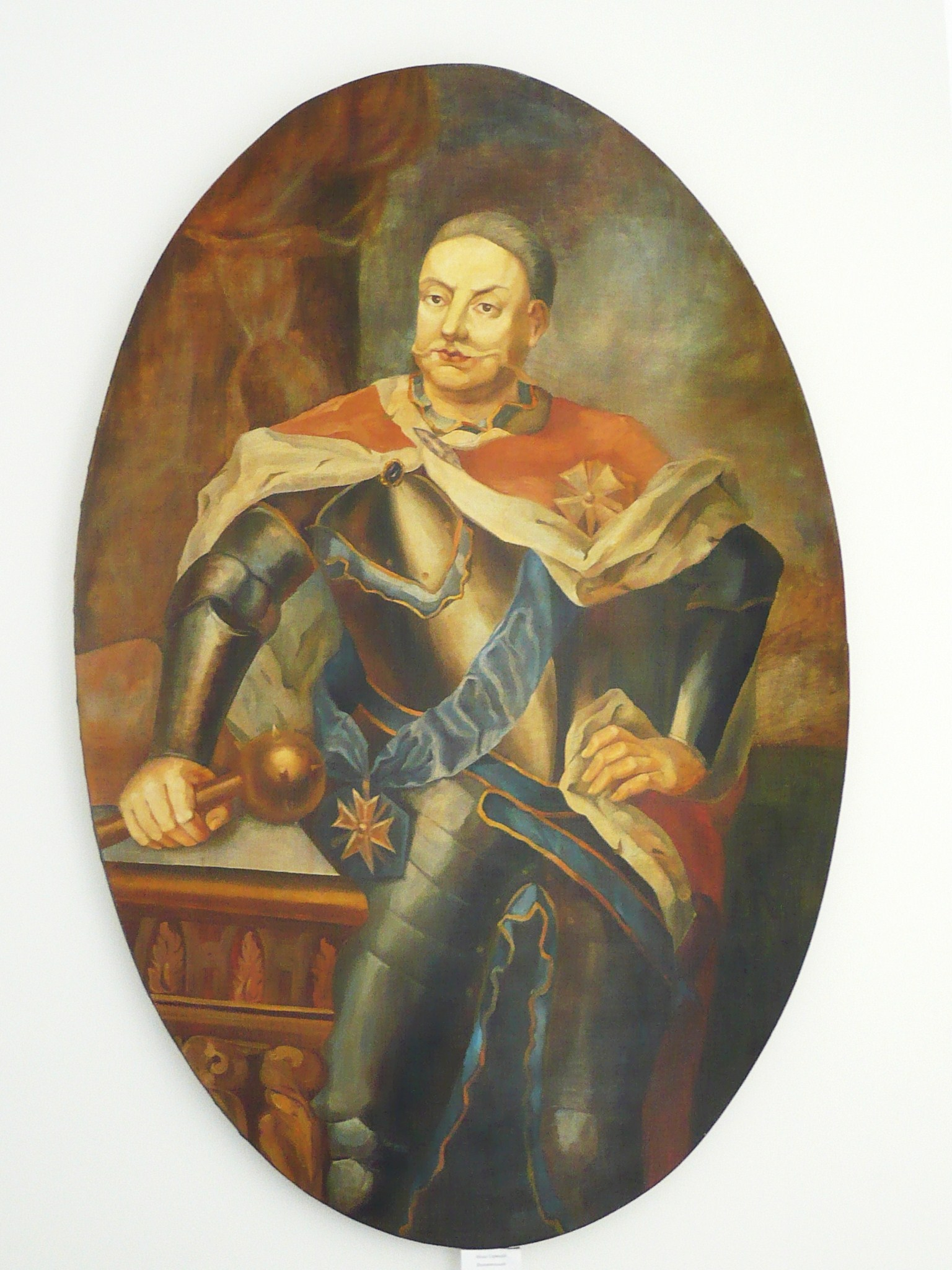 Wiśniowiec, obraz